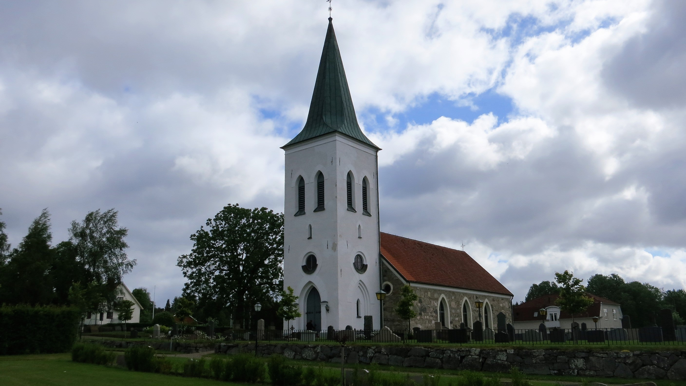 Källeryds kyrka, Växjö stift i Småland